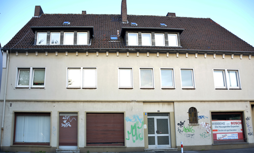 Stolpersteine Dortmund